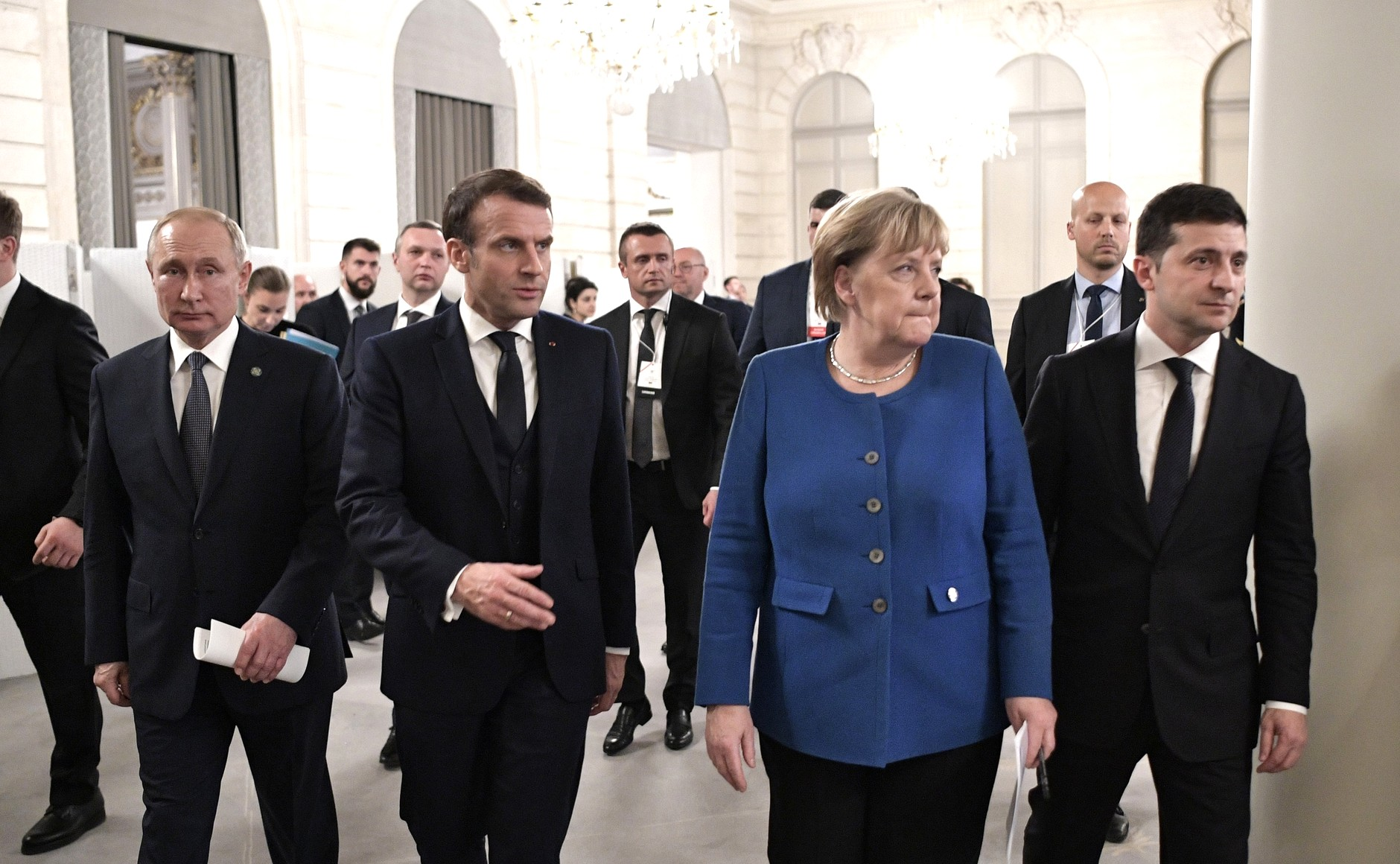 Перед началом совместной пресс-конференции по итогам встречи в «нормандском формате».